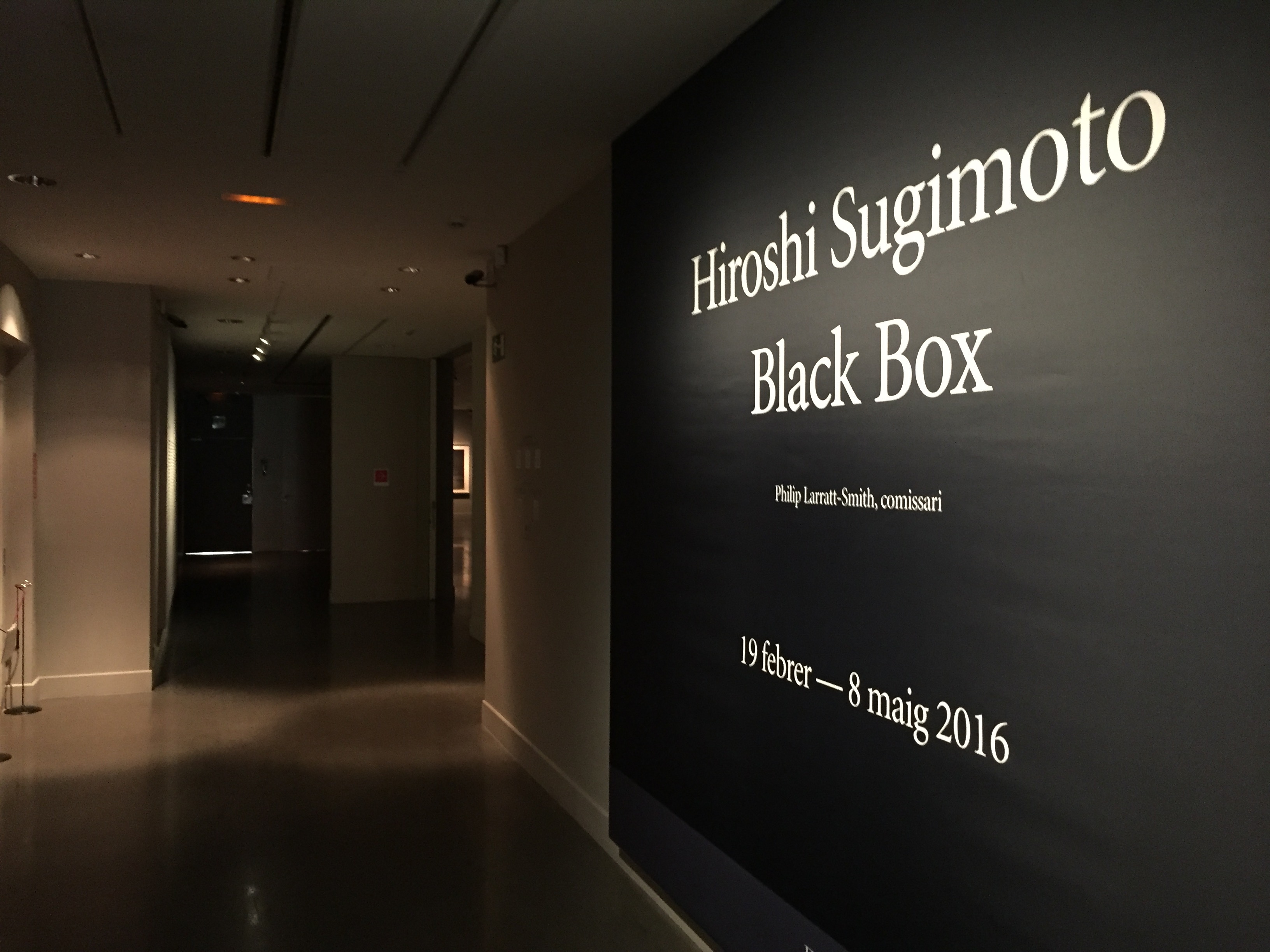 Expo Hiroshi Sugimoto Barcelona